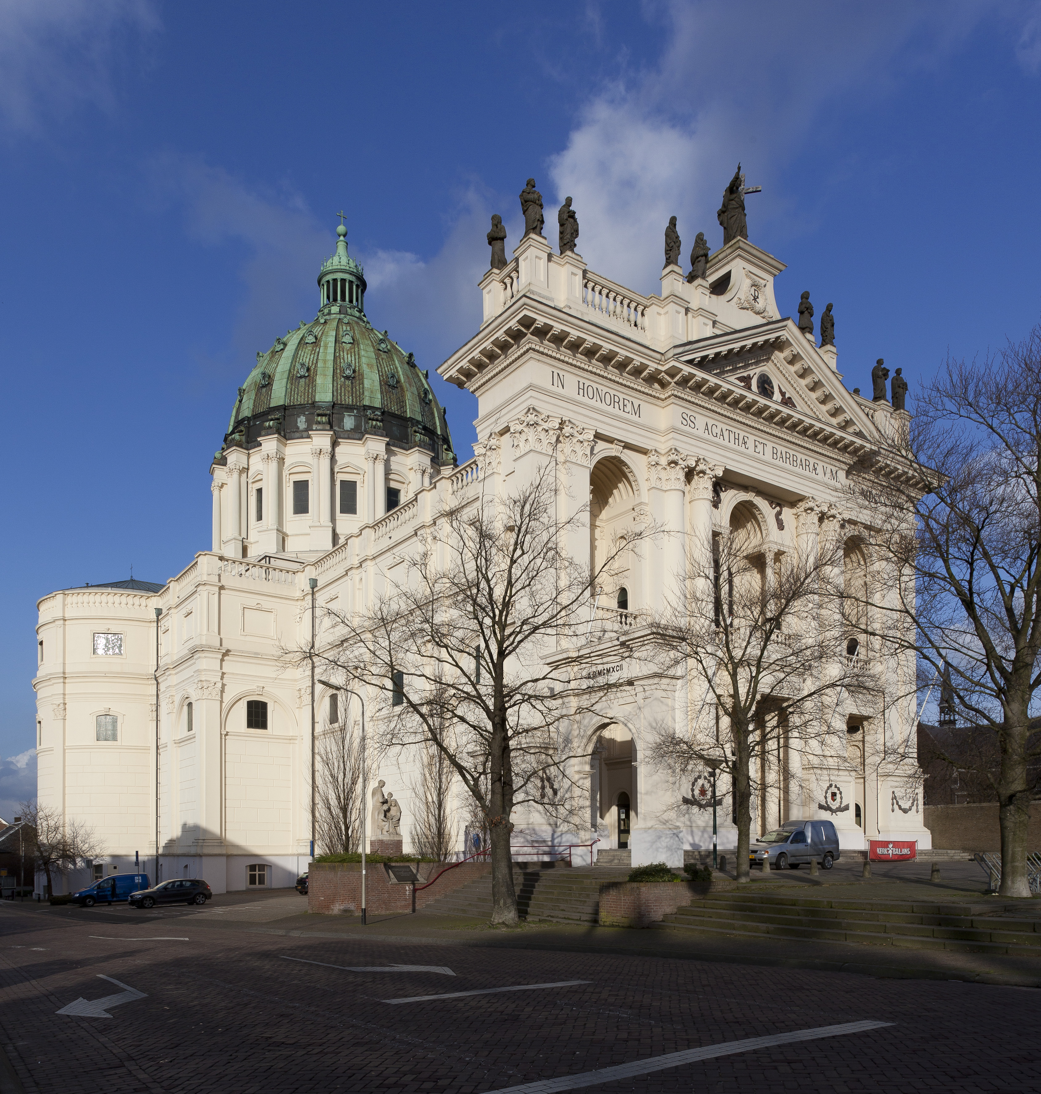 Basiliek Van De Heilige Agatha En Barbara: Overzicht noordgevel en koorzijde met koepel